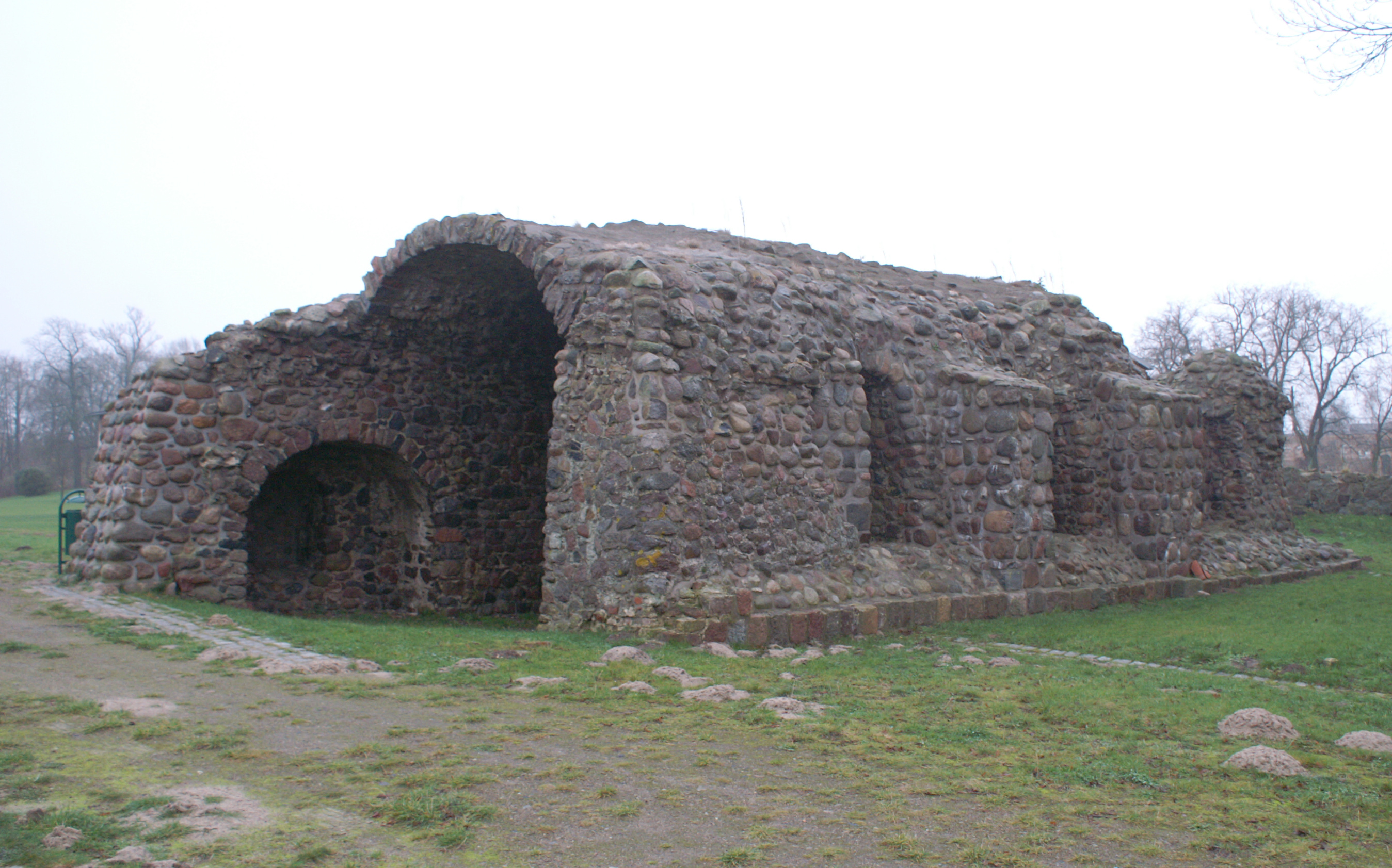 Ruine des Westturmes der Klosterkirche St. Johannes